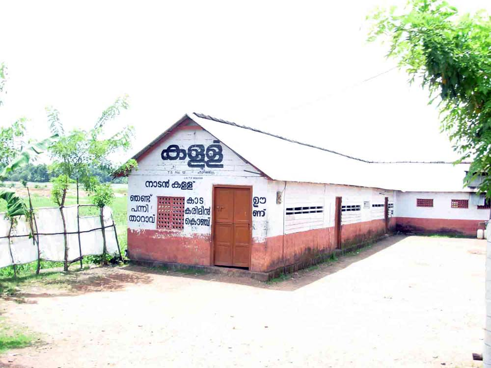 കള്ള് ഷാപ്പ്, ചങ്ങനാശ്ശേരിക്കടുത്ത് നിന്ന്